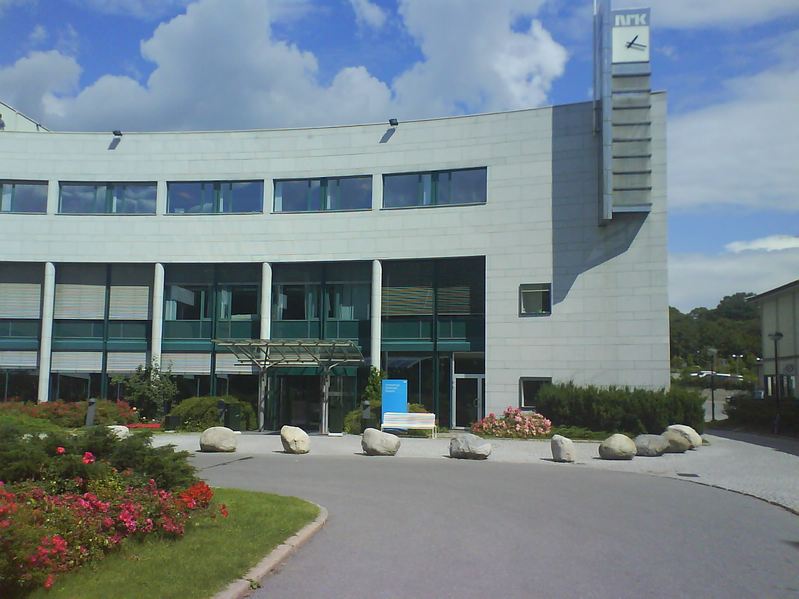 Fjernsynshuset, NRK Marienlyst